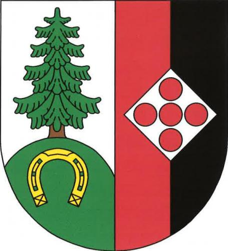 znak obce Lhůta